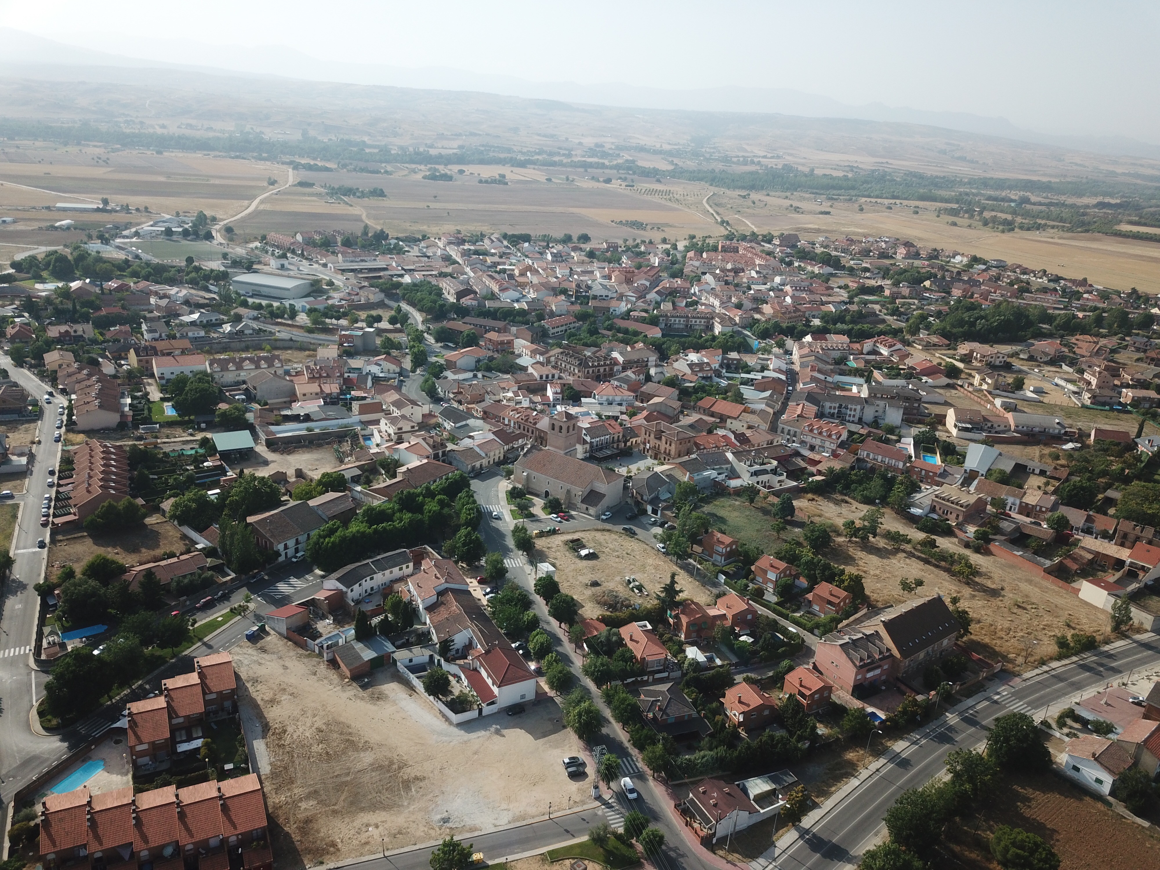 Panorámica de Valdetorres de Jarama en 2018. Realizada con drone respetando la legislación aplicable a estas aeronaves en el momento de la captura.